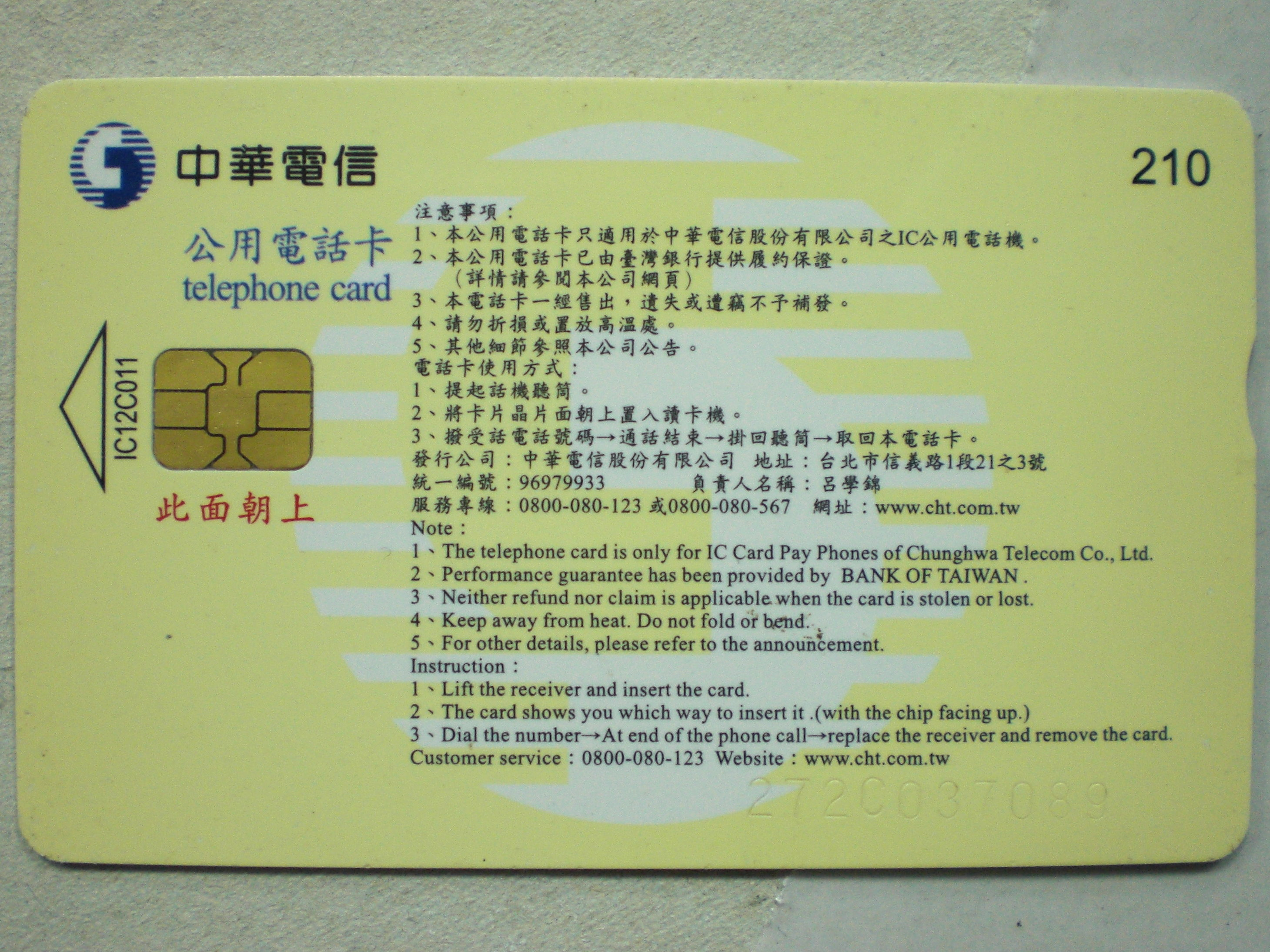 中文（台灣）: 中華電信IC公用電話卡272C037089號晶片面。